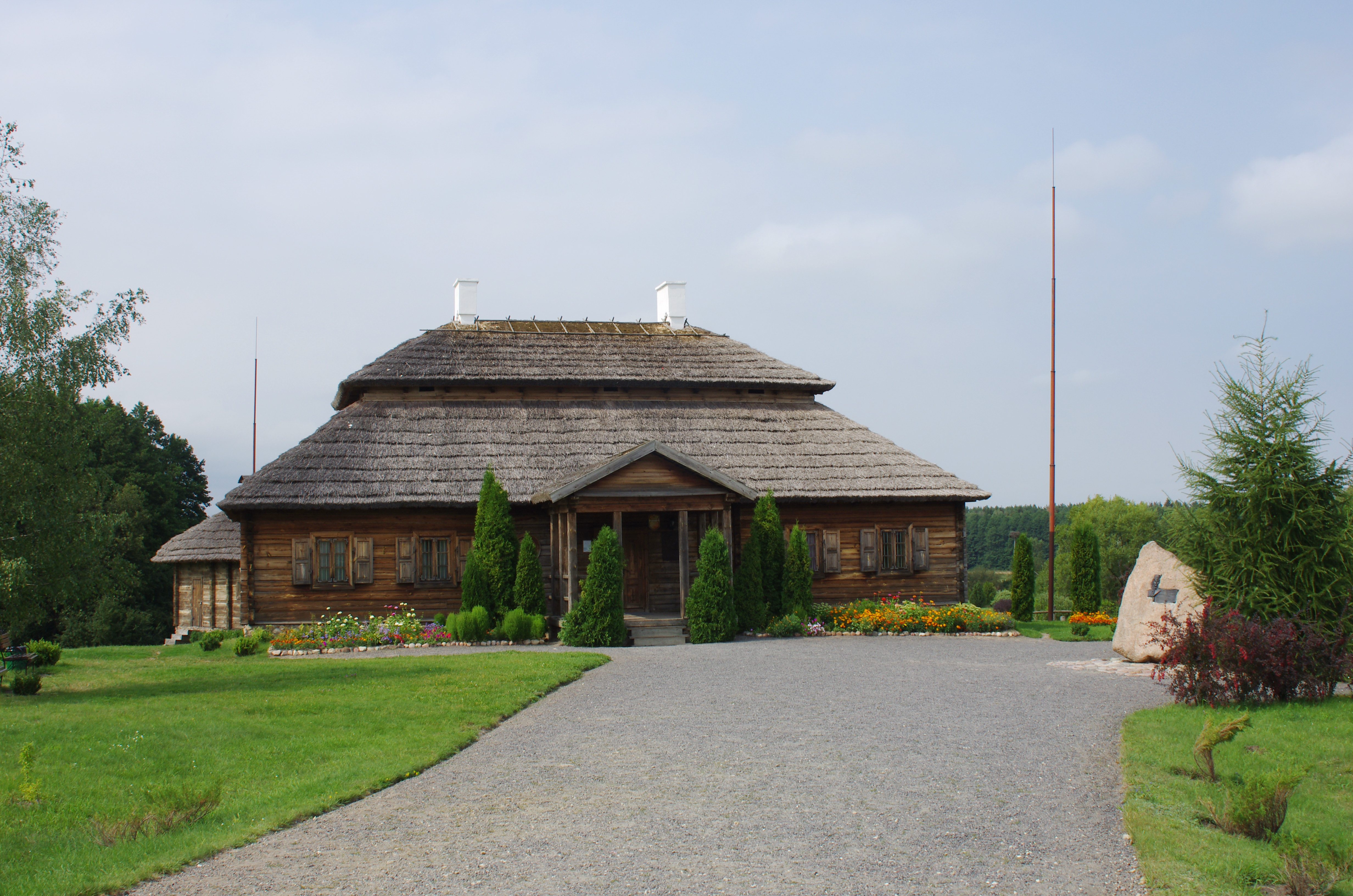 Музей-сядзіба Тадэвуша Касцюшкі